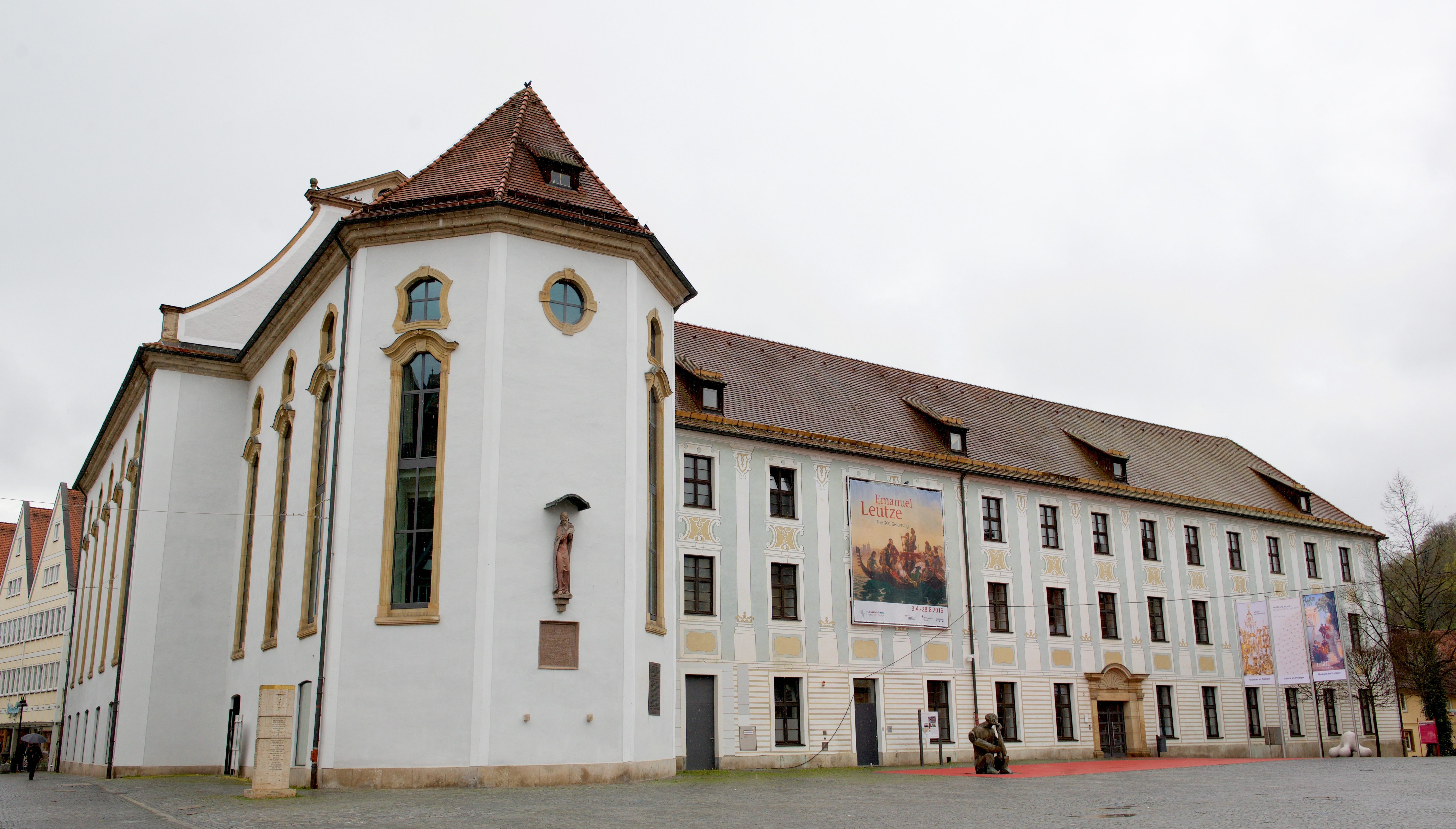 Prediger in Schwäbisch Gmünd